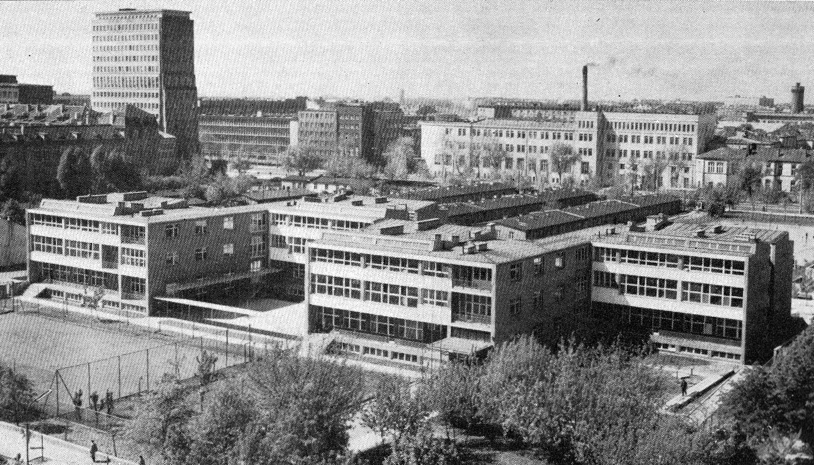 IX Liceum Ogólnokształcące im. Klementyny Hoffmanowej przy ul. Emilii Plater 29 i Szkoła Podstawowej nr 171 im. Wojska Polskiego (ul. Emilii Plater 31) w Warszawie